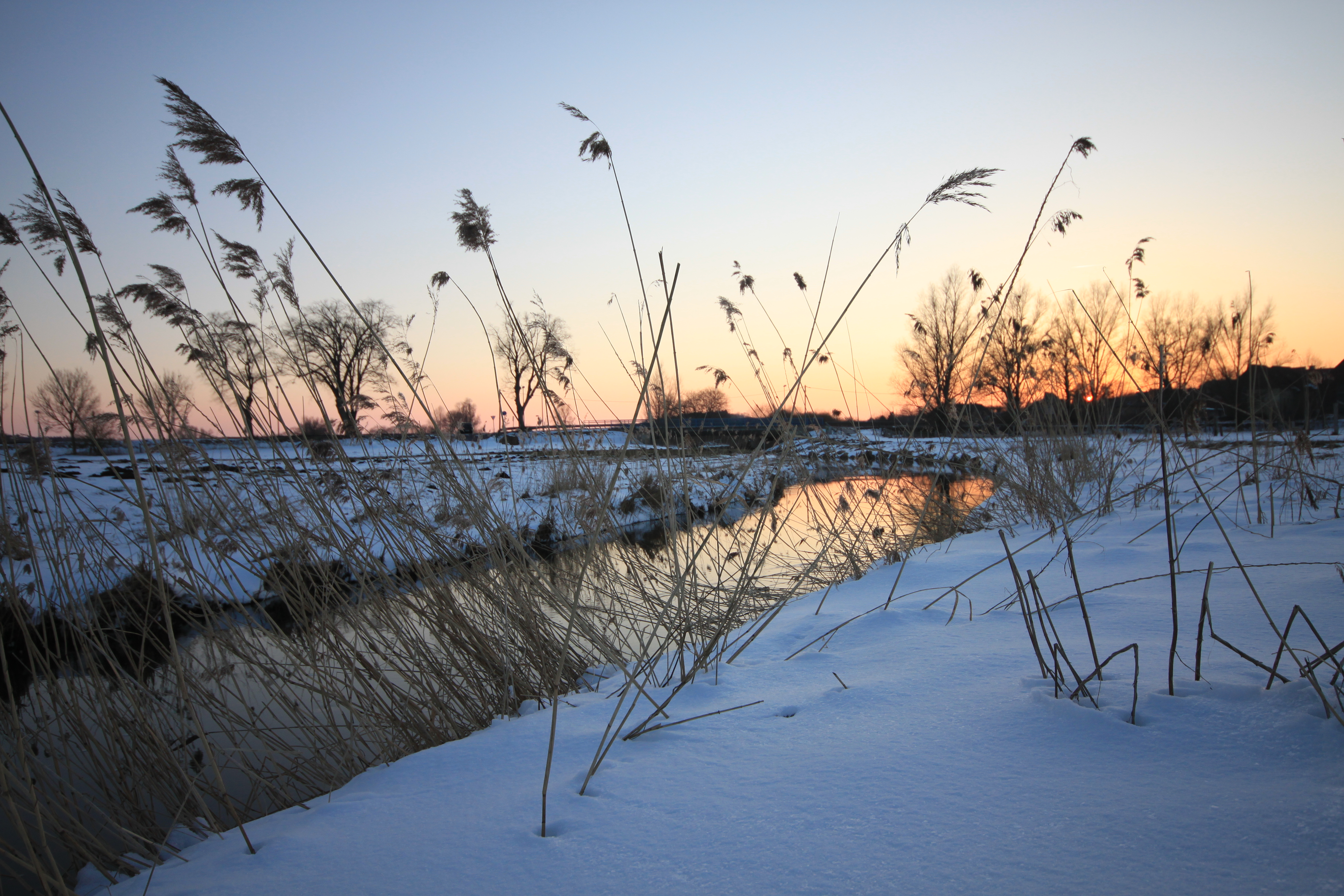 Blick in südwestliche Richtung entlang der Recknitz in Tessin an einem Winterabend, im Hintergrund die Tessiner Brücke (B 110); Bereich im FFH-Gebiet DE-1941-301 „Recknitz- und Trebeltal mit Zuflüssen“, Mecklenburg-Vorpommern